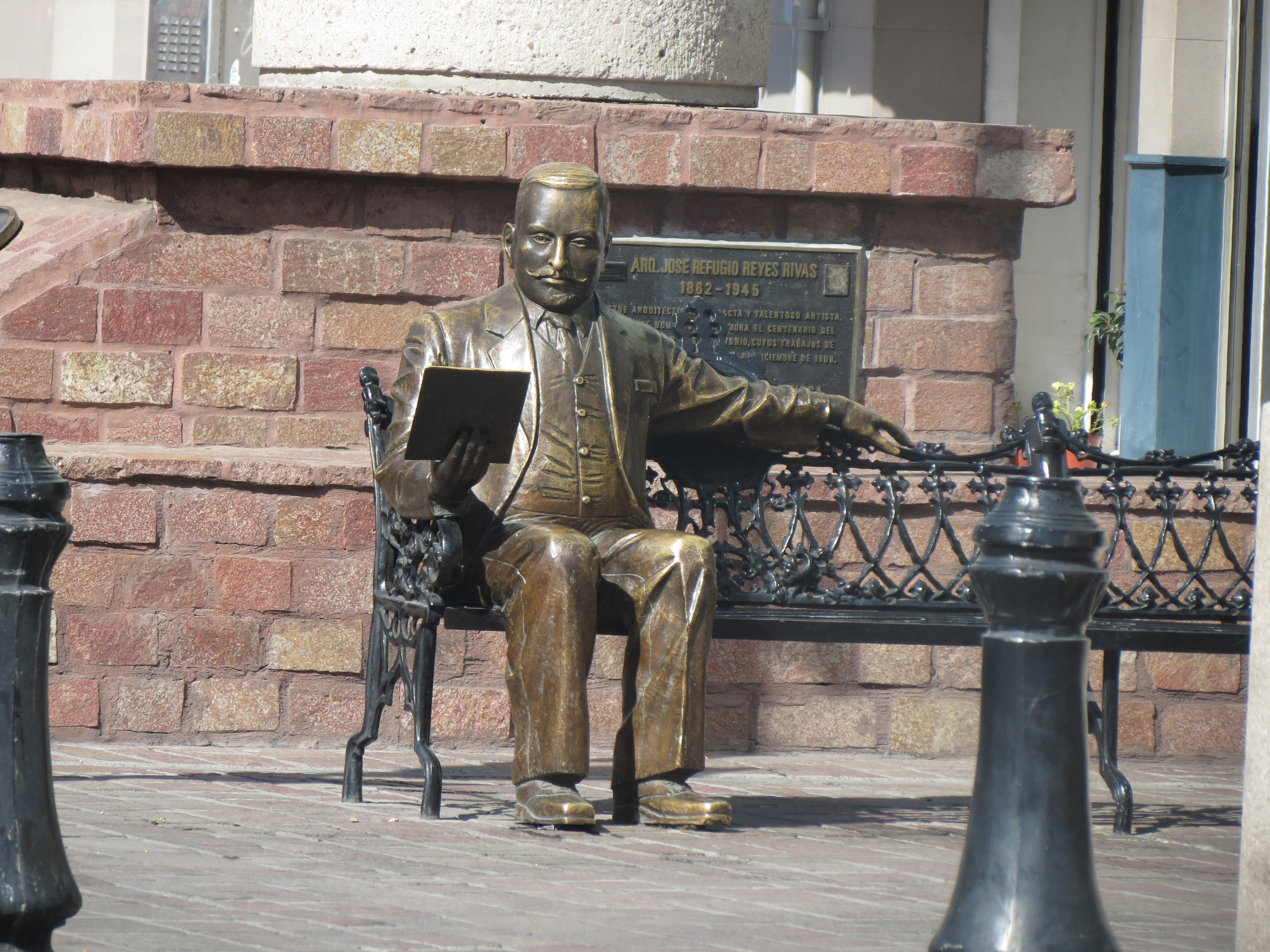 Monumento al arquitecto Refugio Reyes Rivas, ubicado en la Ciudad de Aguascalientes, justo enfrente de una de sus obras, el Templo de San Antonio.